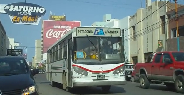 Linea 5 sacada en rivadavia